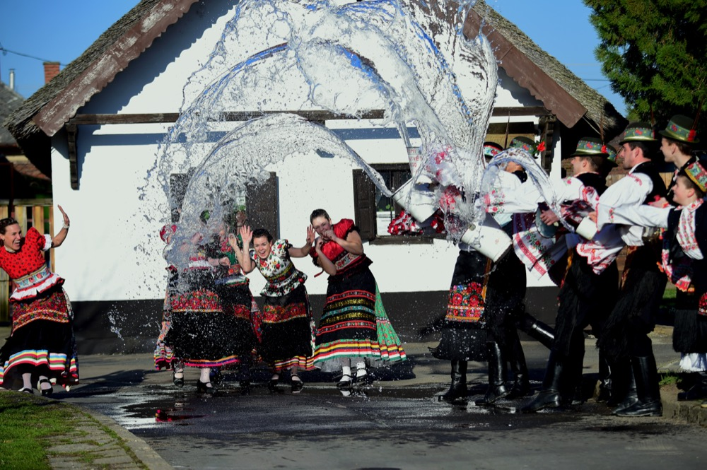 Matyó Húsvét